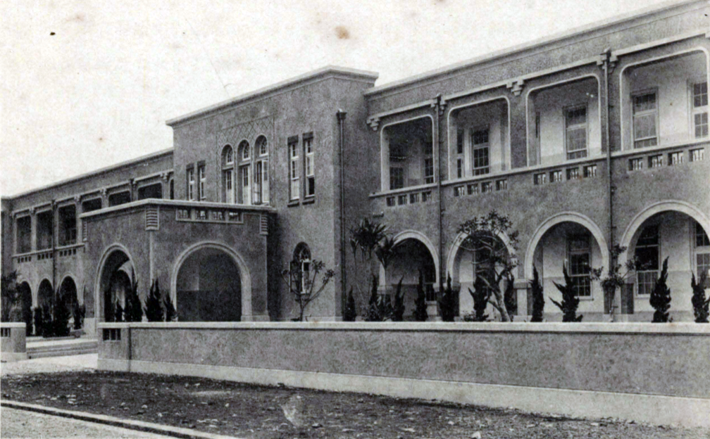 中文（台灣）: 臺灣總督府立新竹醫院，原址為新竹大遠百